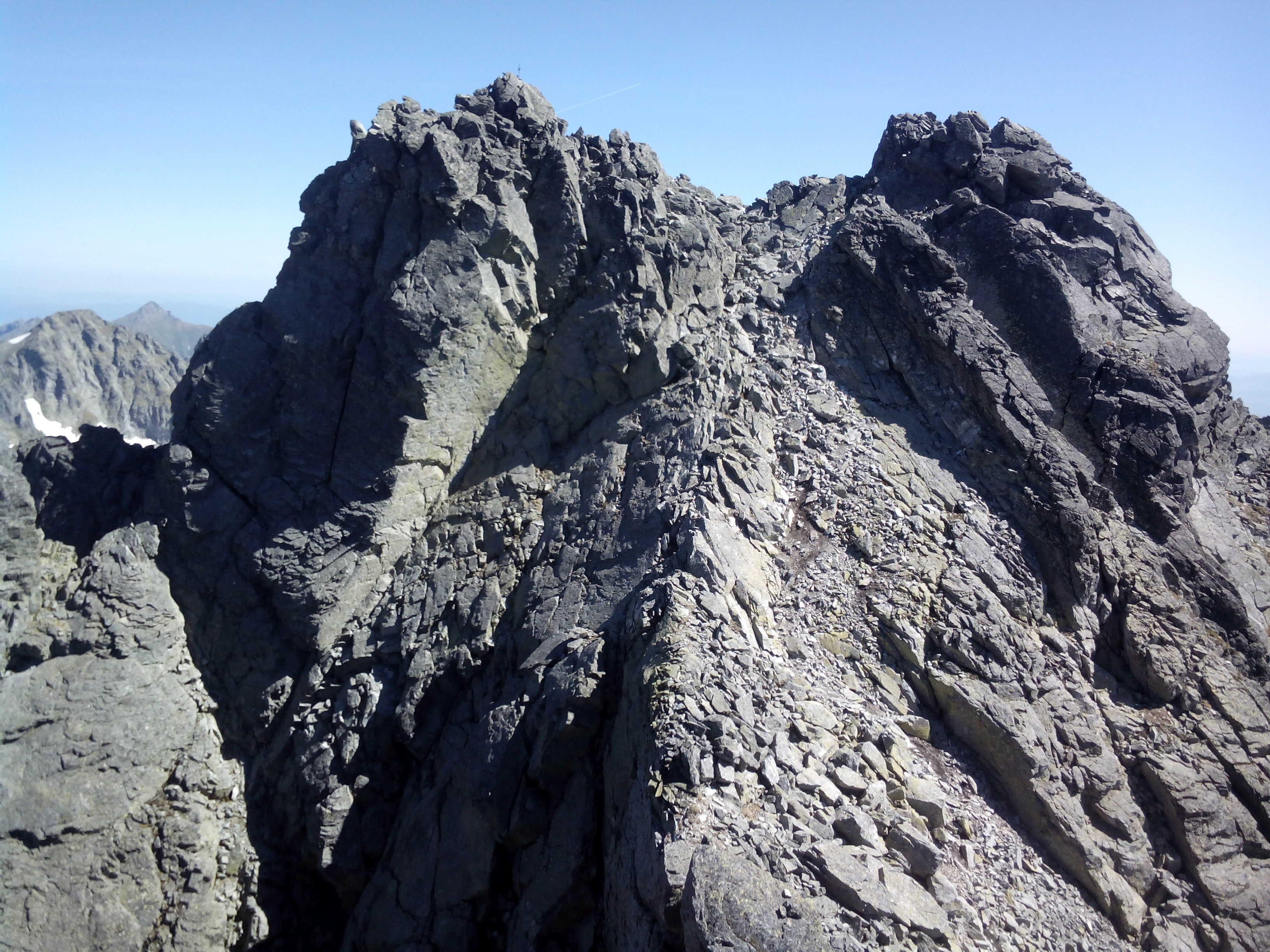 Klimkowa Turnia i Tajbrowa Turnia w Staroleśnym Szczycie